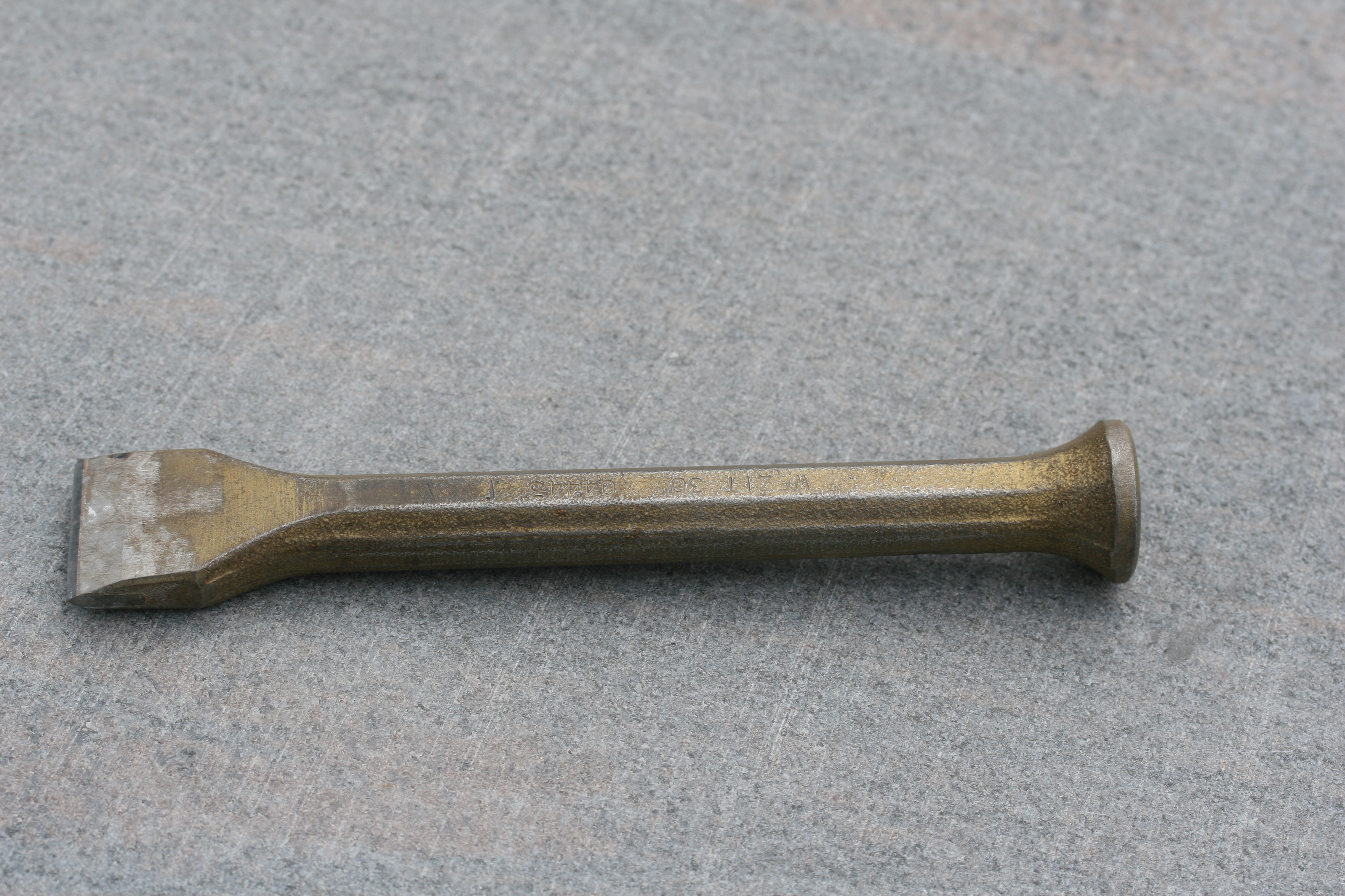 Schlageisen